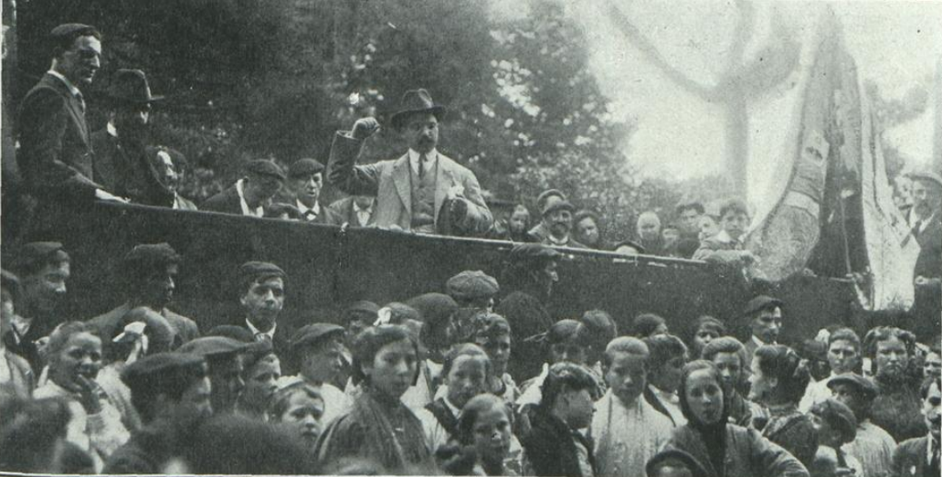 El orador Arsenio Izaga hablando en nombre de la Juventud Tradionalista de Orduña